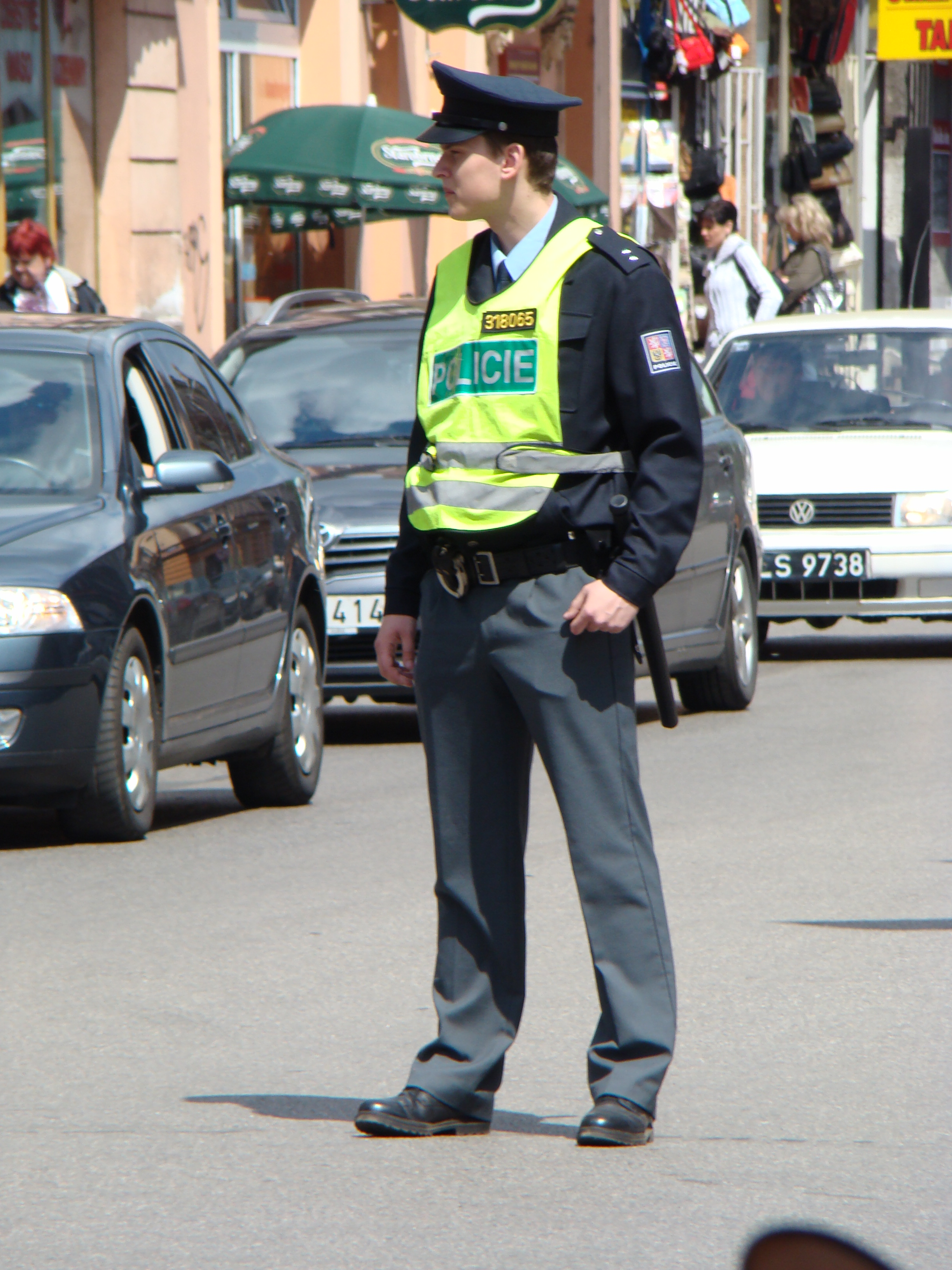 Czech Police (Policie České Republiky) officer in Český Těšín (Czeski Cieszyn)